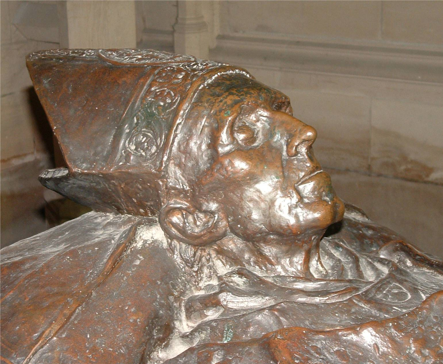 Grafika:MechelenMercier.jpg